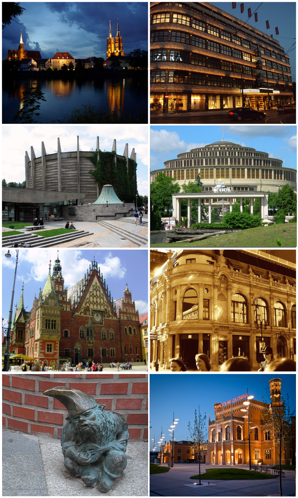 Ostrów Tumski we Wrocławiu